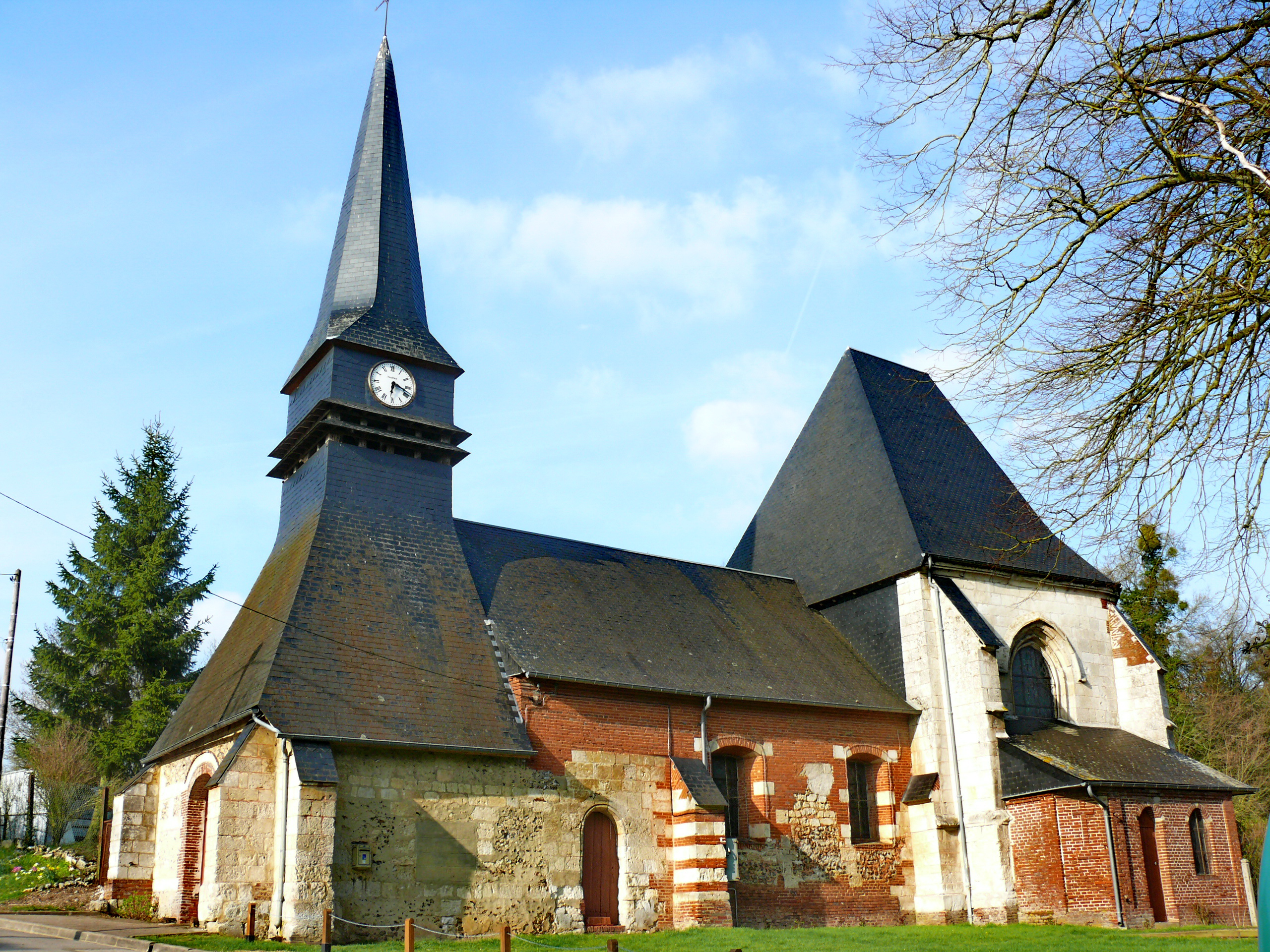 OFFOY (Oise) : l'Eglise